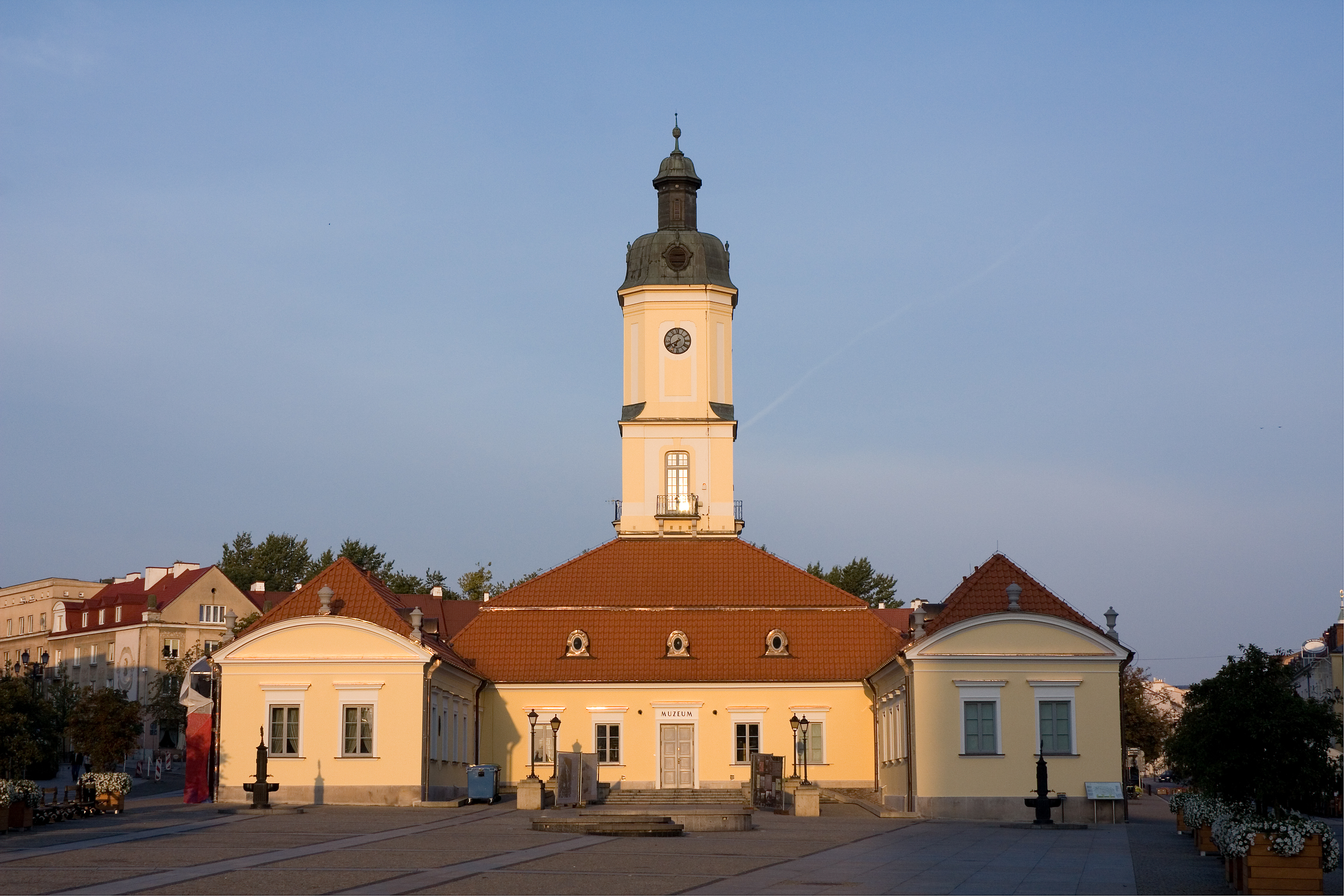 Białystok, ratusz, ob. muzeum, 1745-1761